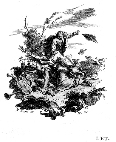 Saverio Bettinelli. Illustrazioni de Dieci lettere di Publio Virgilio Marone. Scritte dagli Elisj all'Arcadia di Roma sopra gli abusi introdutti nella poesia italiana. Venezia: Modesto Fenzo, 1758 (Illustrazione Lettera nona)